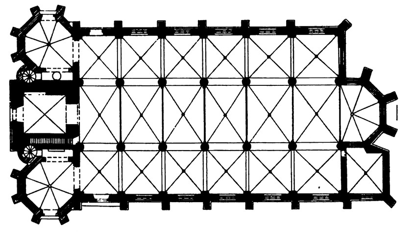 St. Maria Himmelfahrt (Mönchengladbach)